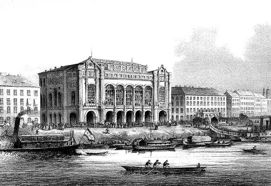 Pesti Vigadó